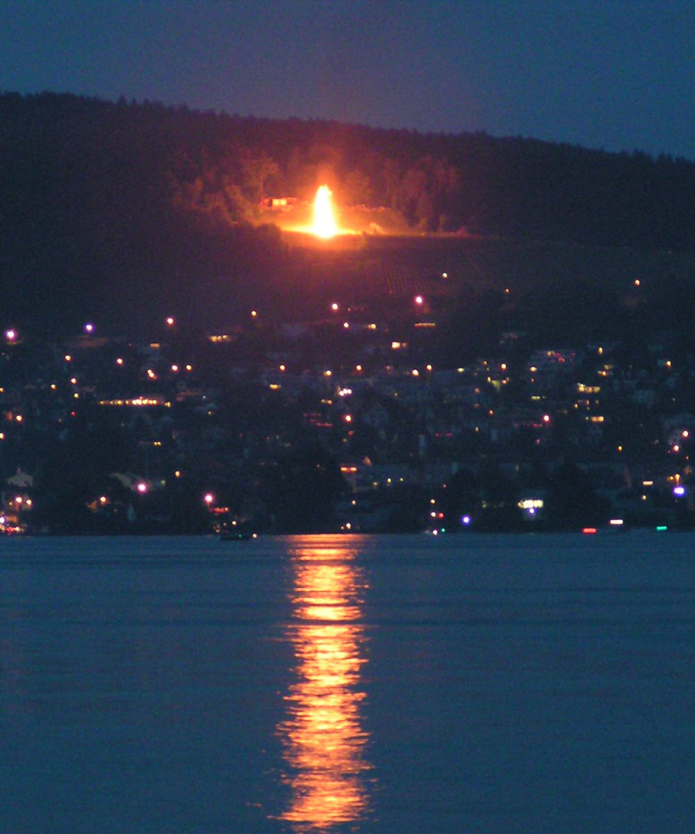 Höhenfeuer am 1. August 2004 (oberes rechtes Zürichseeufer)